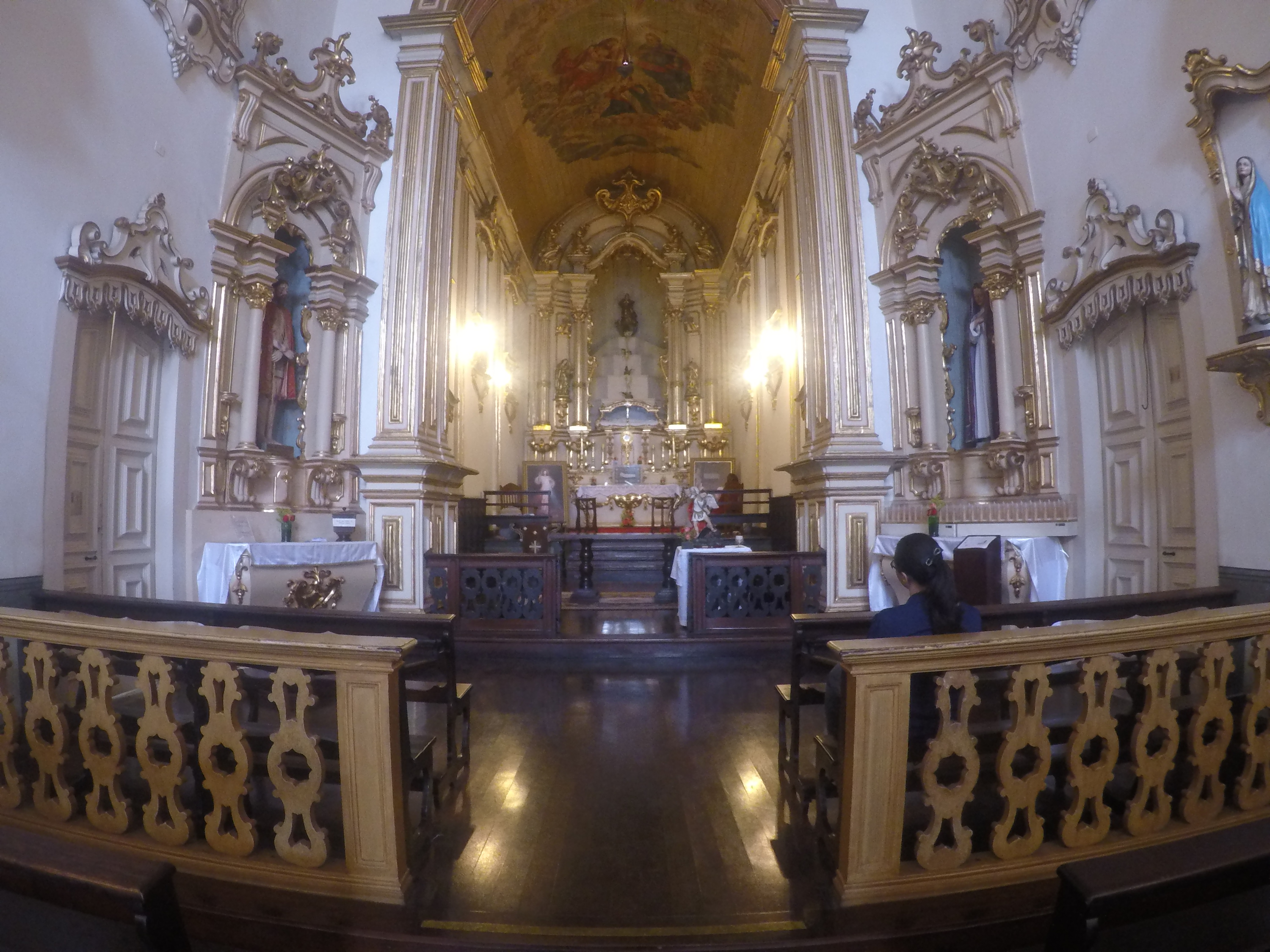 Altar para reza e missa da Igreja Nossa Senhora da Boa Morte, São Paulo (SP)